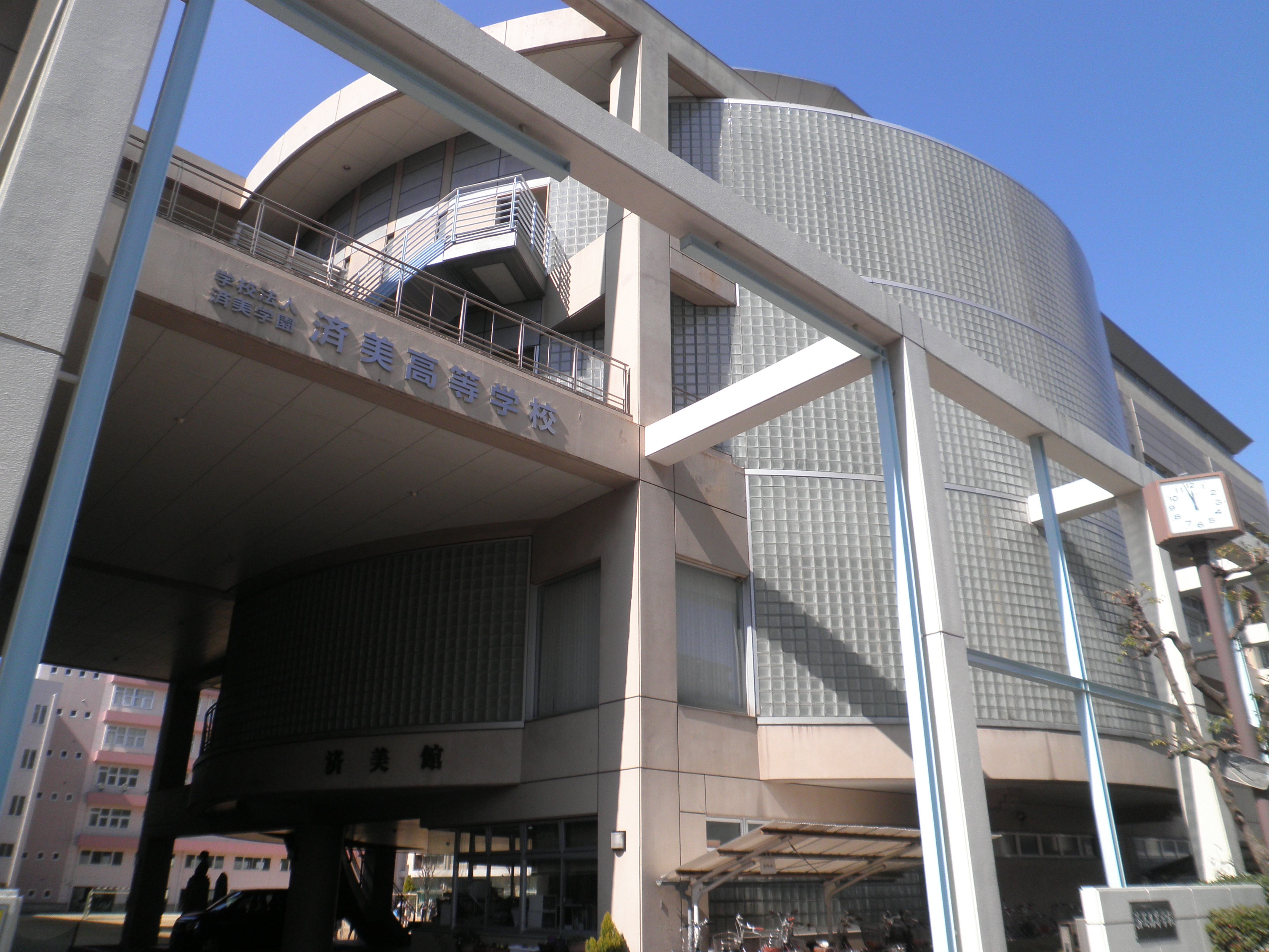 愛媛県松山市湊町の済美高校